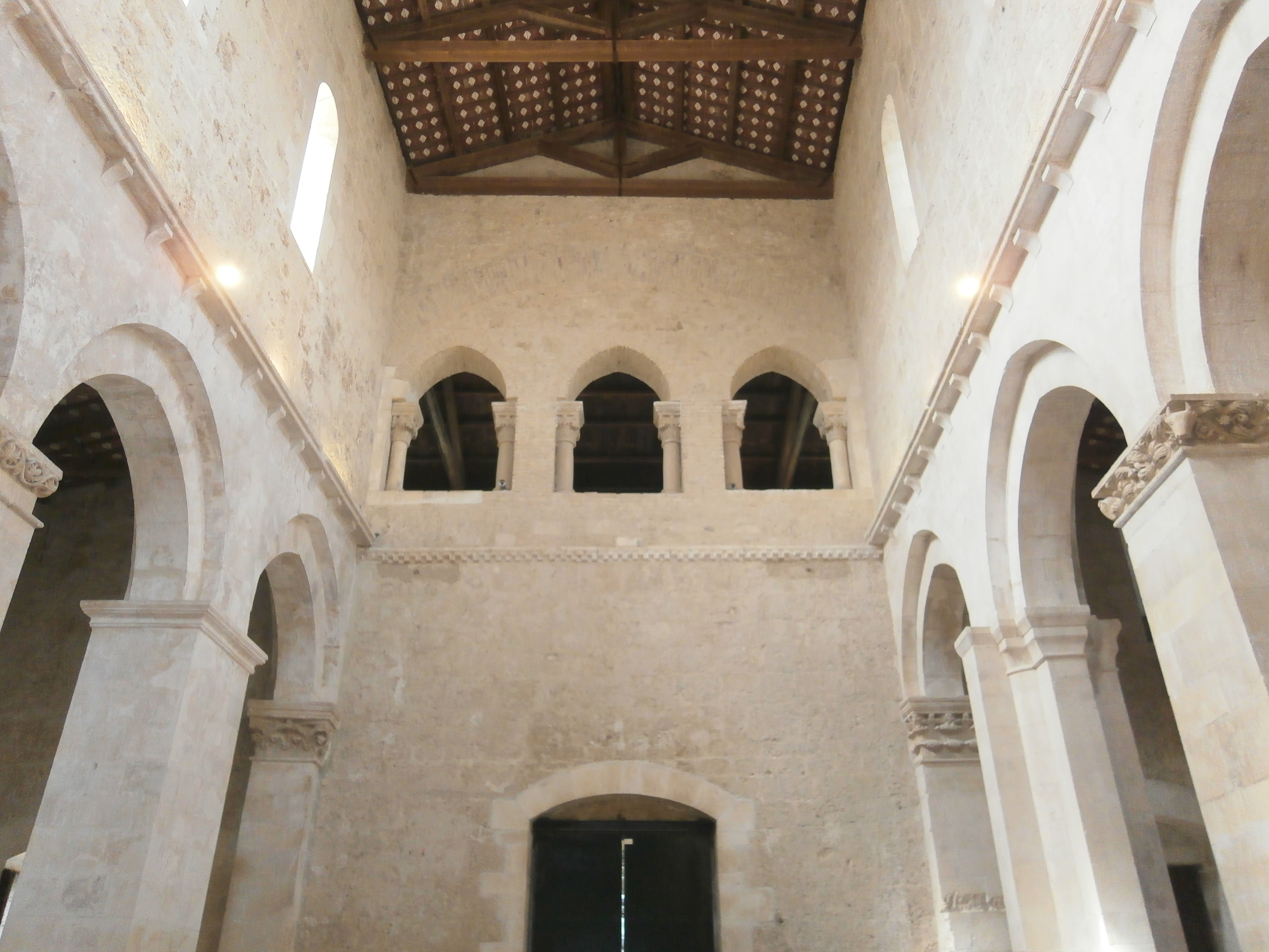 Abbazia di San Clemente a Casauria